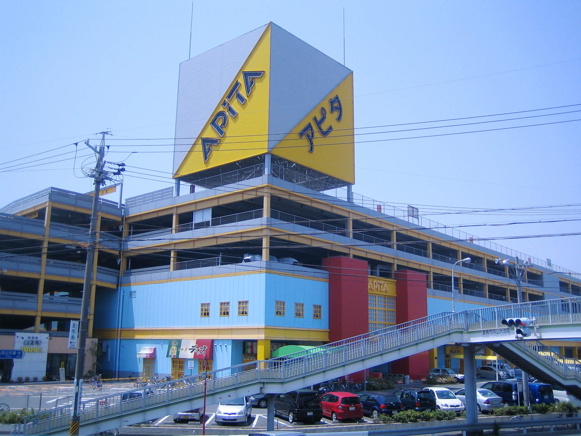 アピタ向山店。愛知県豊橋市 APITA Mukaiyama (アピタ向山店), located in Toyohashi, Aichi, Japan